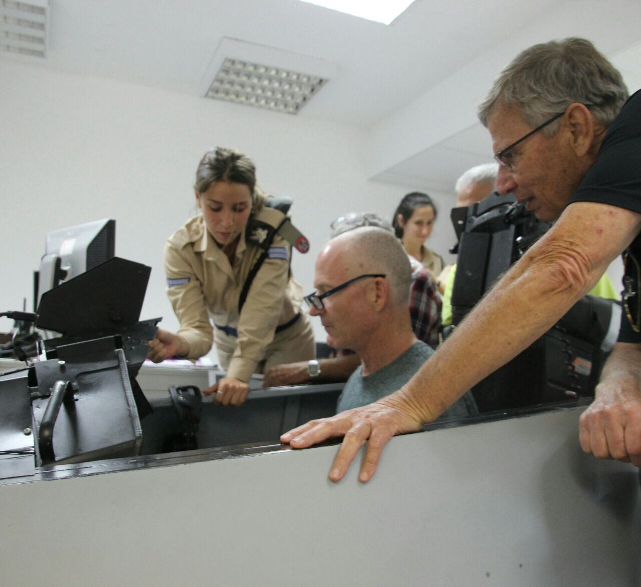 מבצע "ערצב 19". מימין: אבי ברבר.